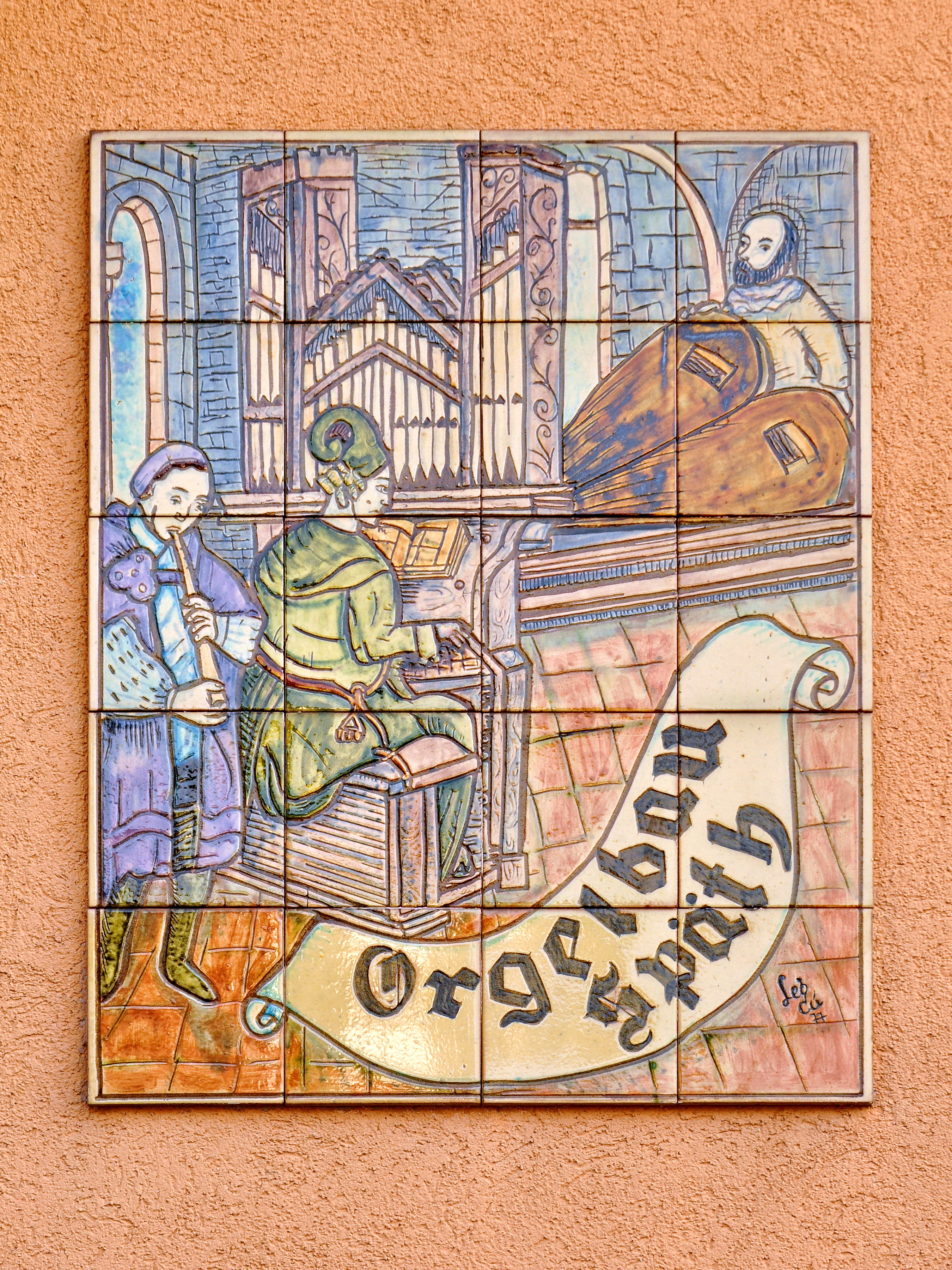 Giessi in Rapperswil (Switzerland)